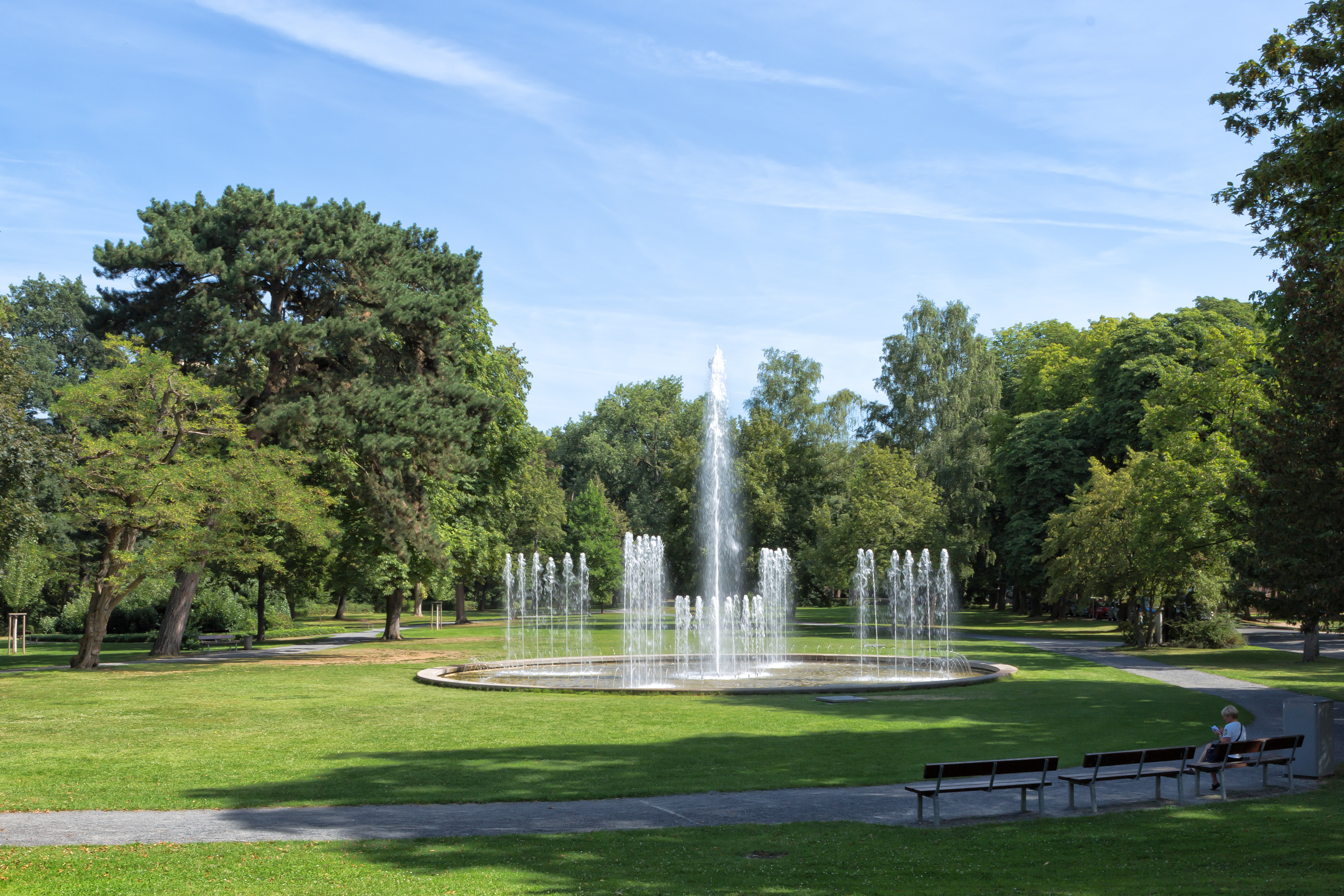 Schweinfurt - Wehranlage - 2016